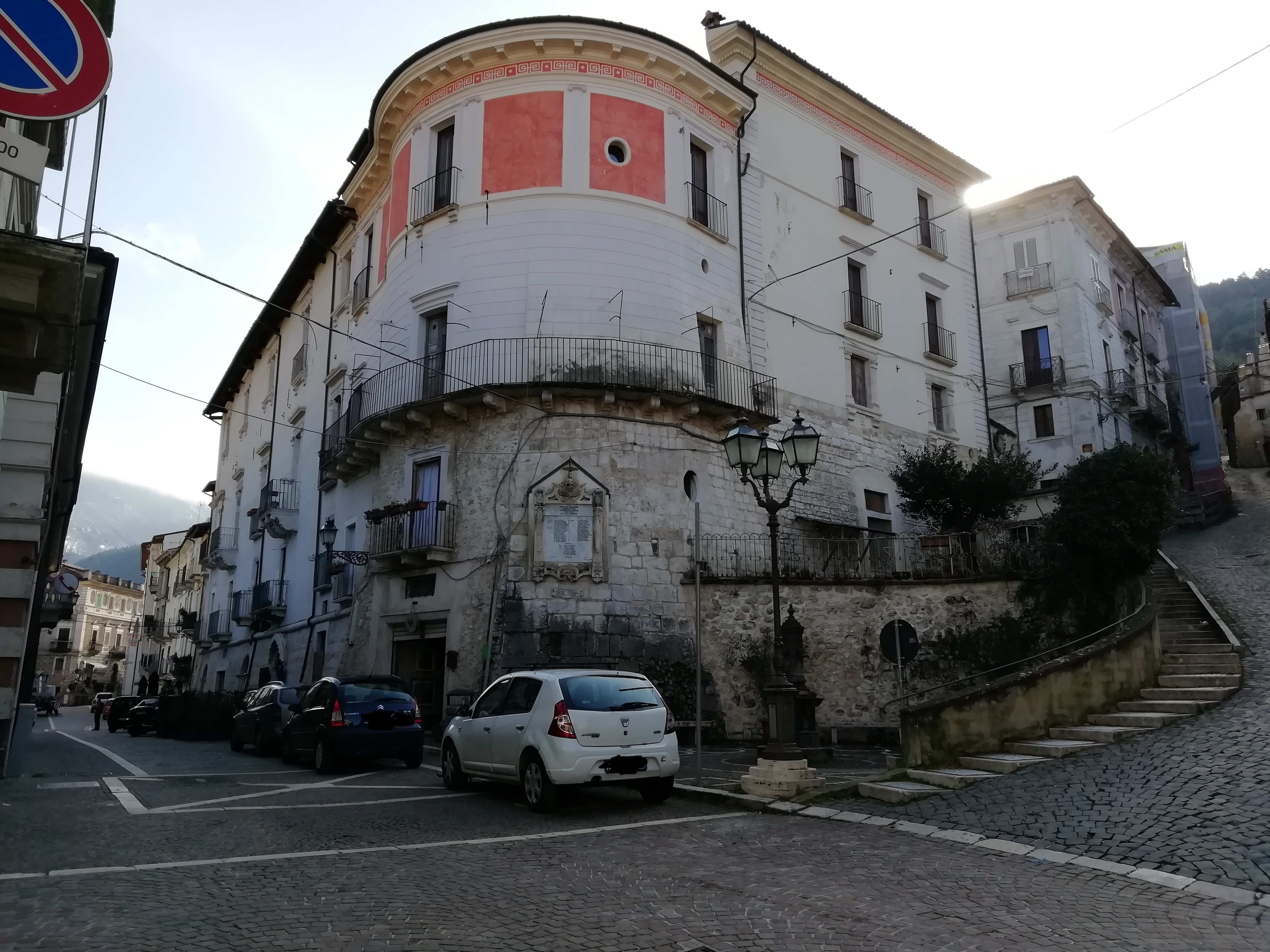 This palace was part of the ancient wall, next times was converted as a lord palace.